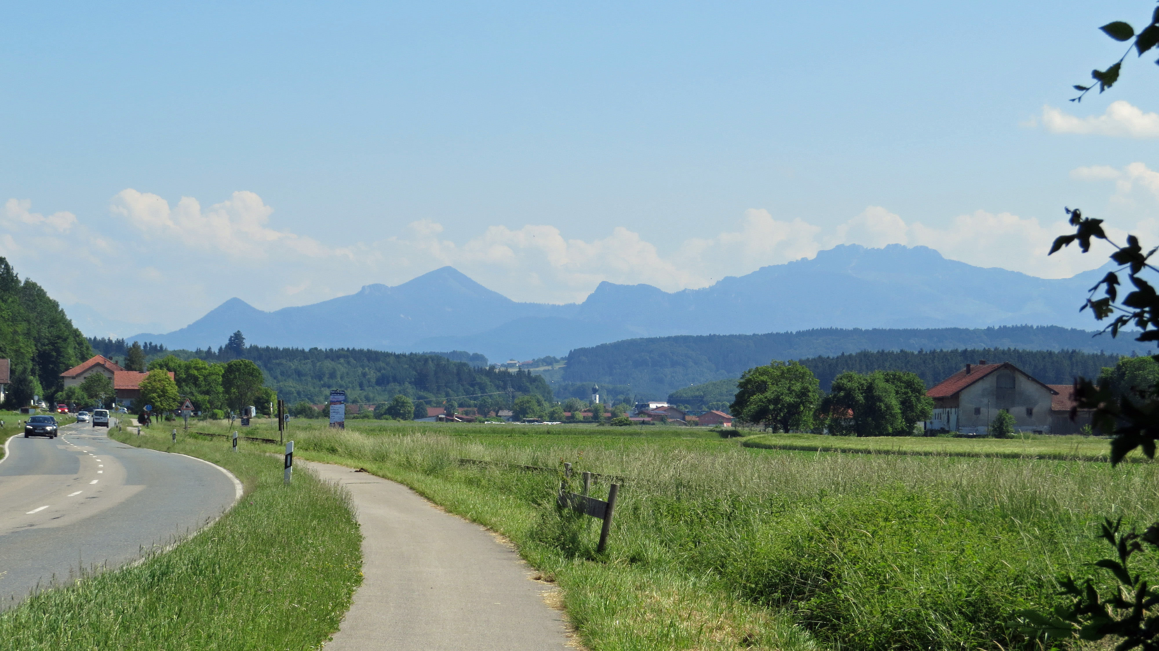 Bad Endorf von Norden